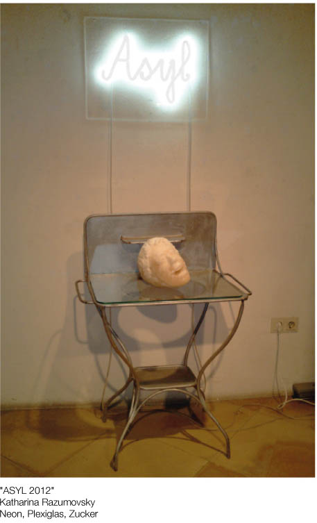 Installation (Neon, Plexiglas, Zucker)